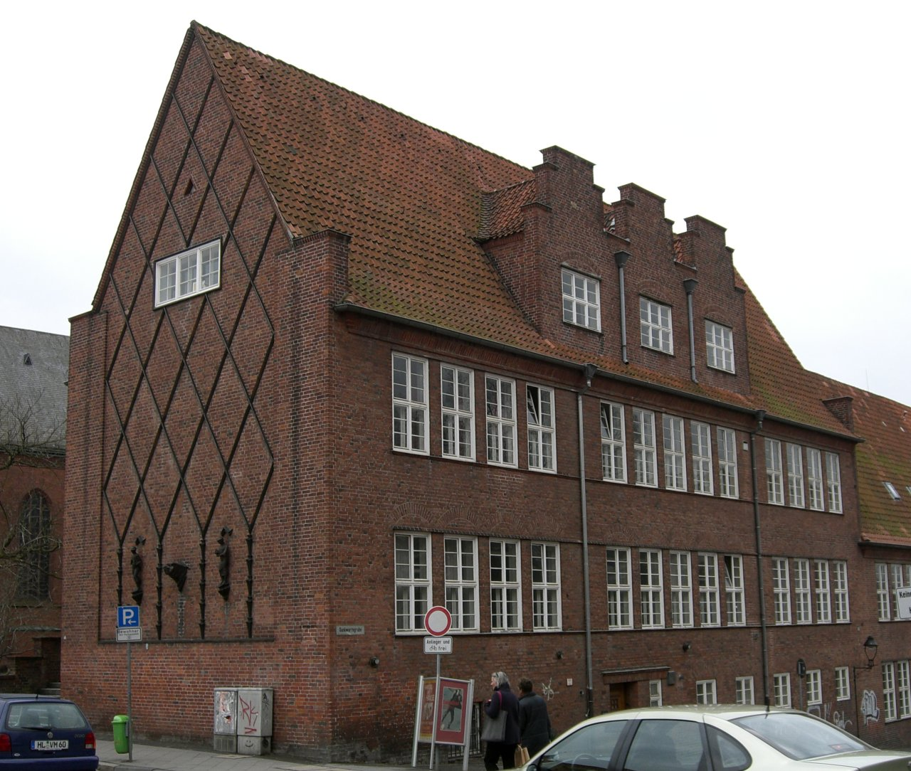 Gewerbeschule Lübeck (Virck, 1926) selbst aufgenommen